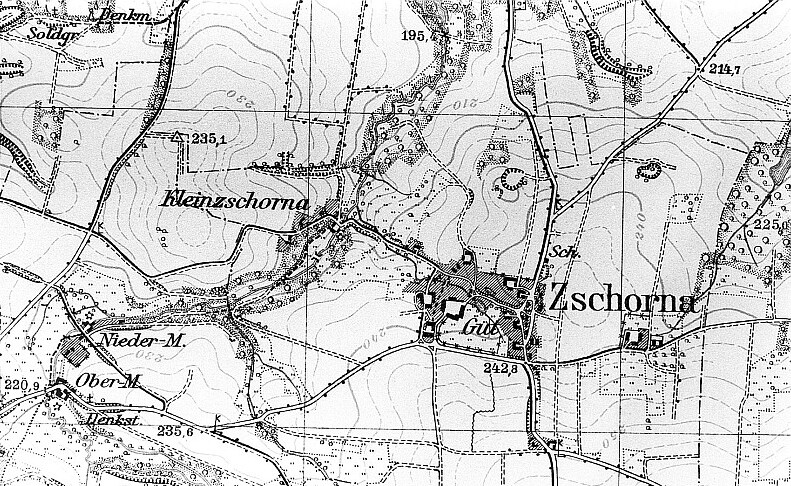 Original image description from the Deutsche Fotothek Hochkirch-Zschorna. Meßtischblatt, Sekt. Hochkirch, Nr. 4853